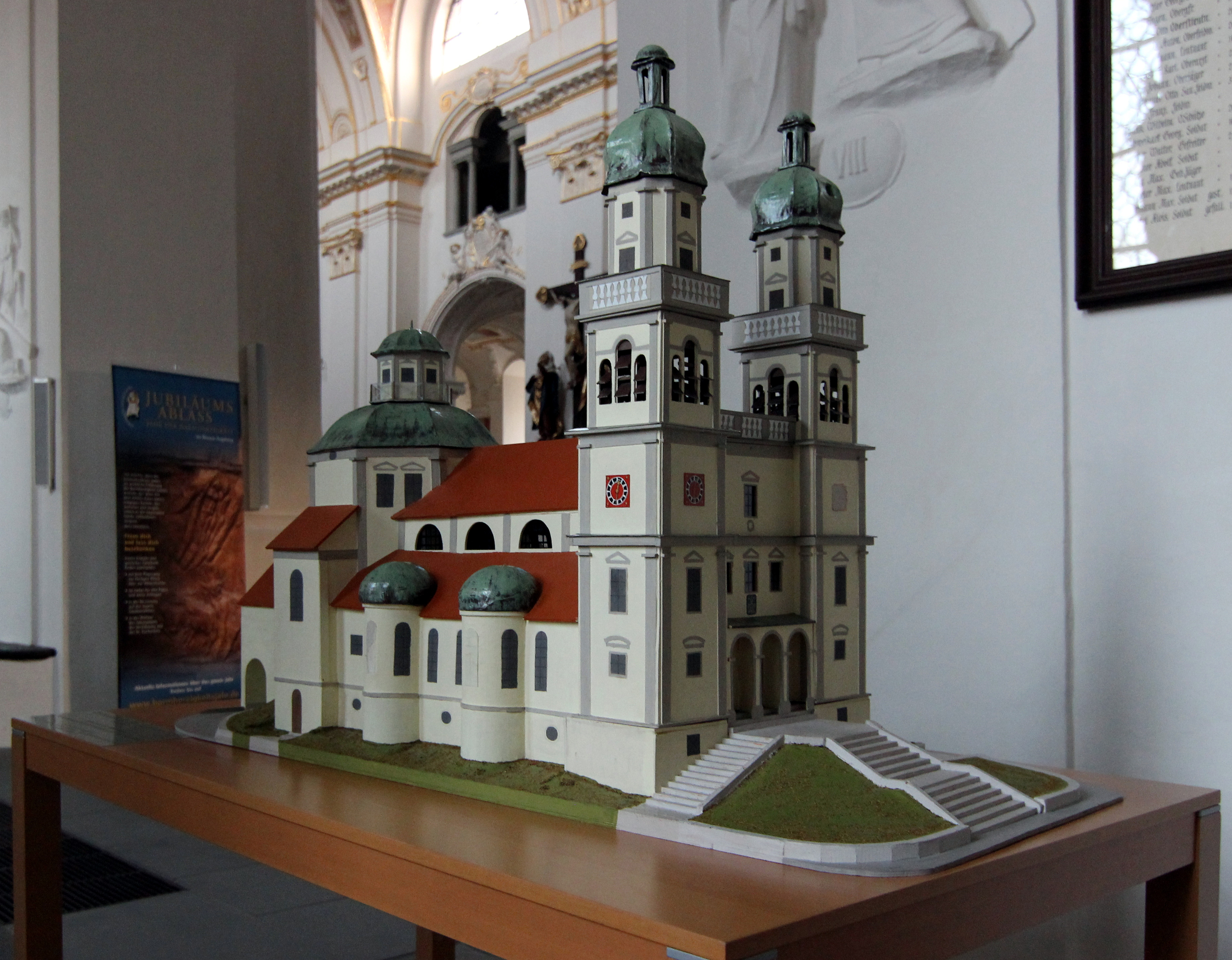 Tastmodell der Basilika St. Lorenz in Kempten, Standort in der hier als Modell abgebildeten Kirche.